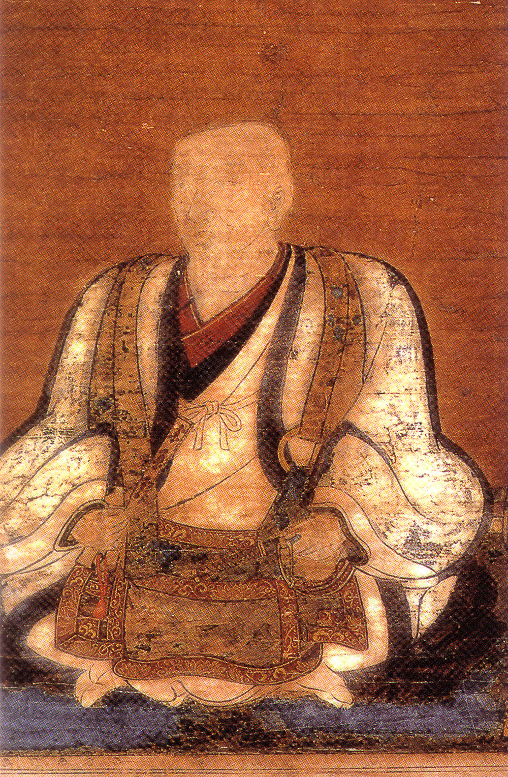 高橋紹運像